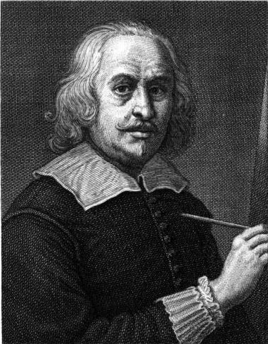 Jacopo Vignali, florentine painter